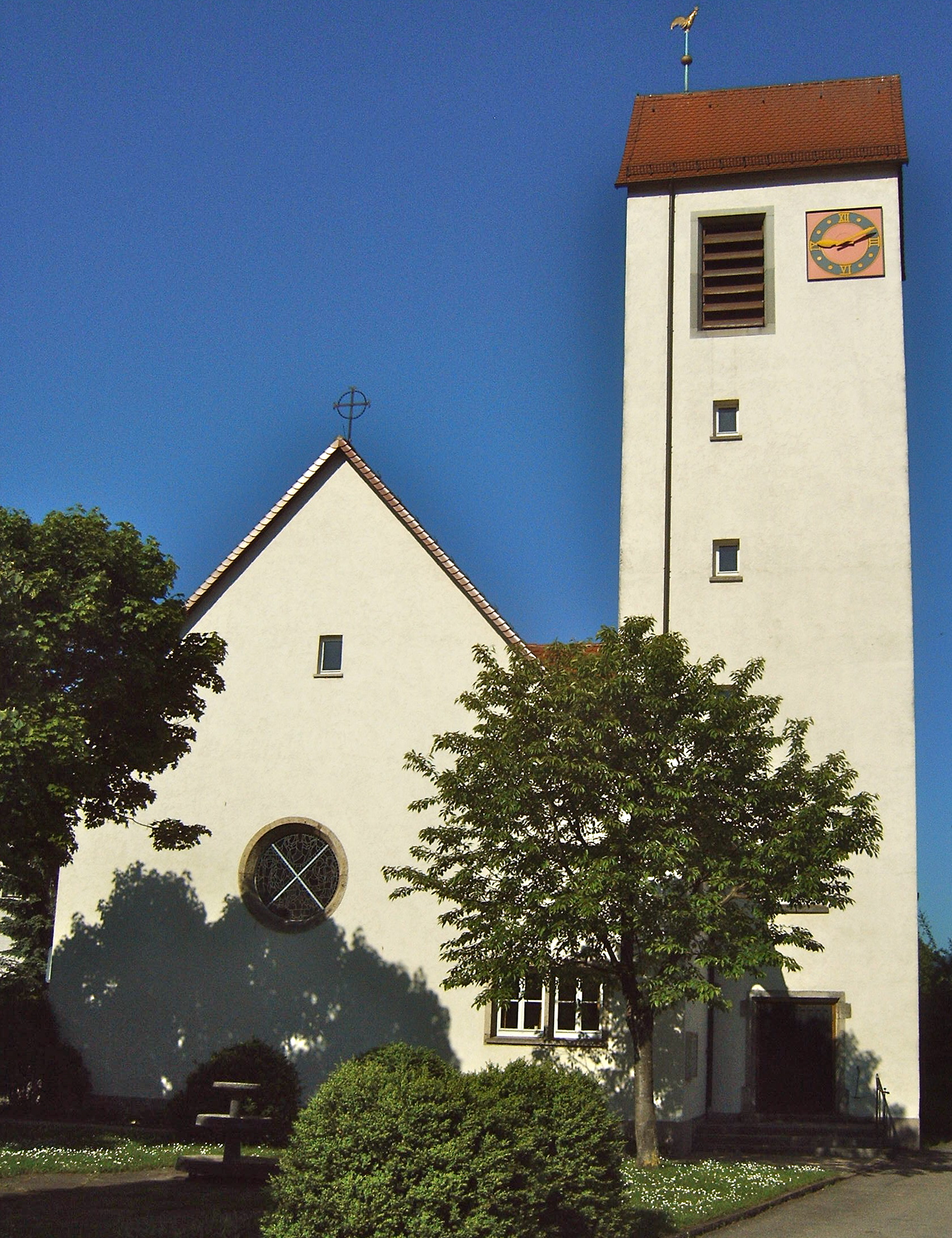 Martin-Luther-Kirche in Lorch-Waldhausen